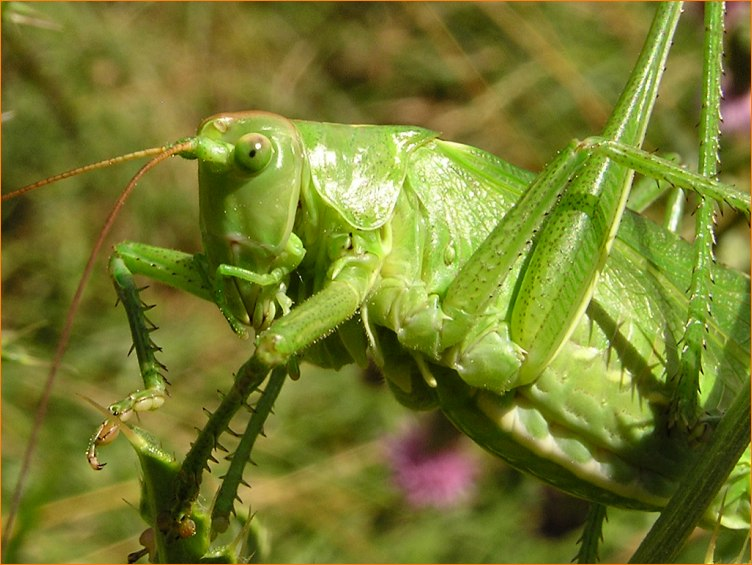 Sauterelle verte (Phaneroptera Nana )